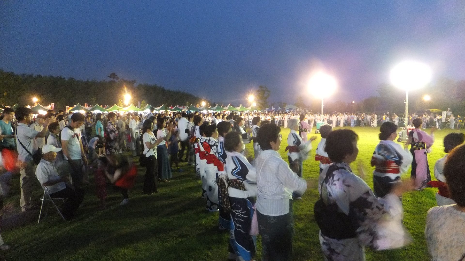 みっきぃ夏まつり花火大会 吉川音頭